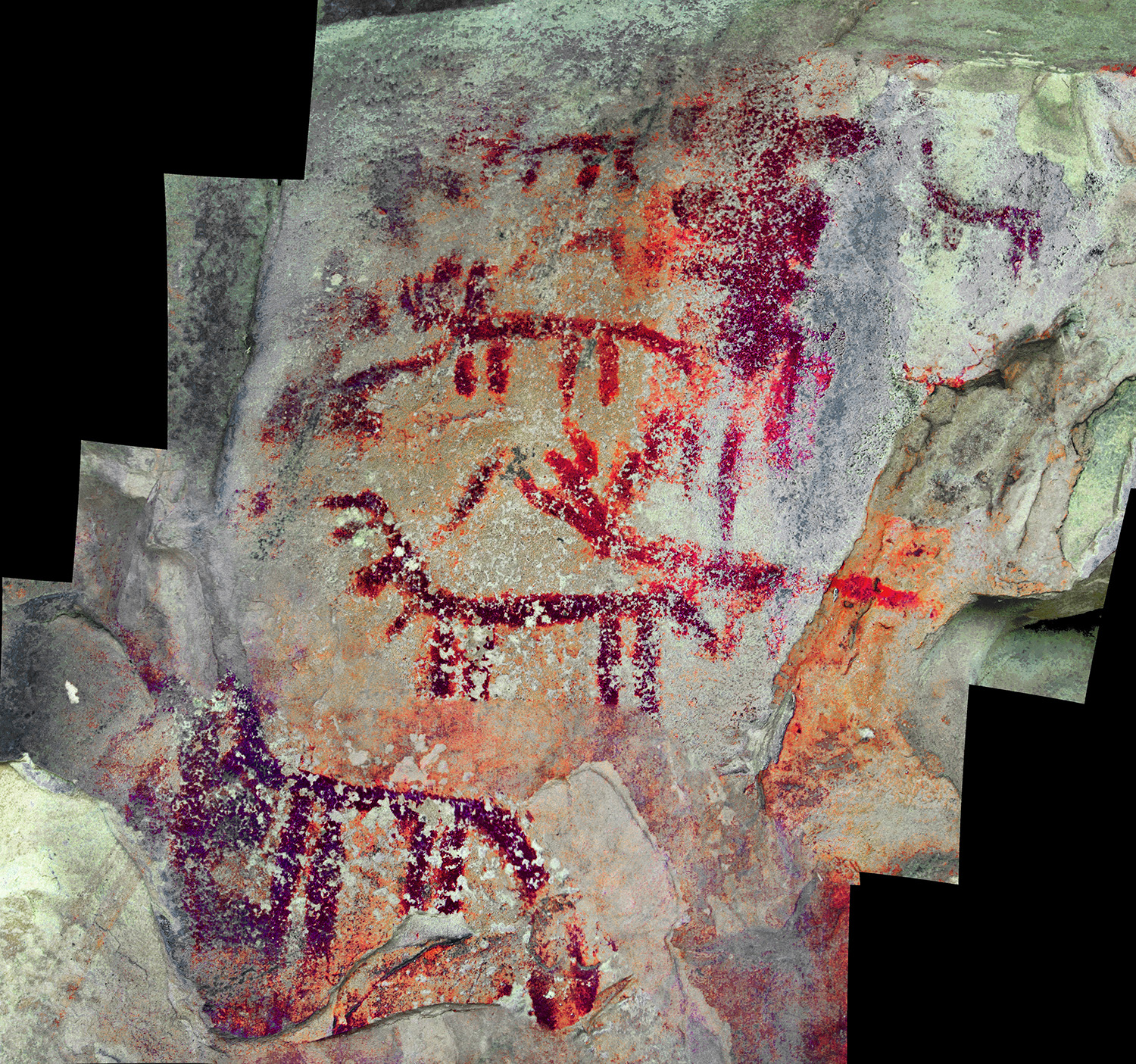 Riparo Ranaldi Shelter, il pannello principale, fotomosaico ed esasperazione cromatica (foto AA)